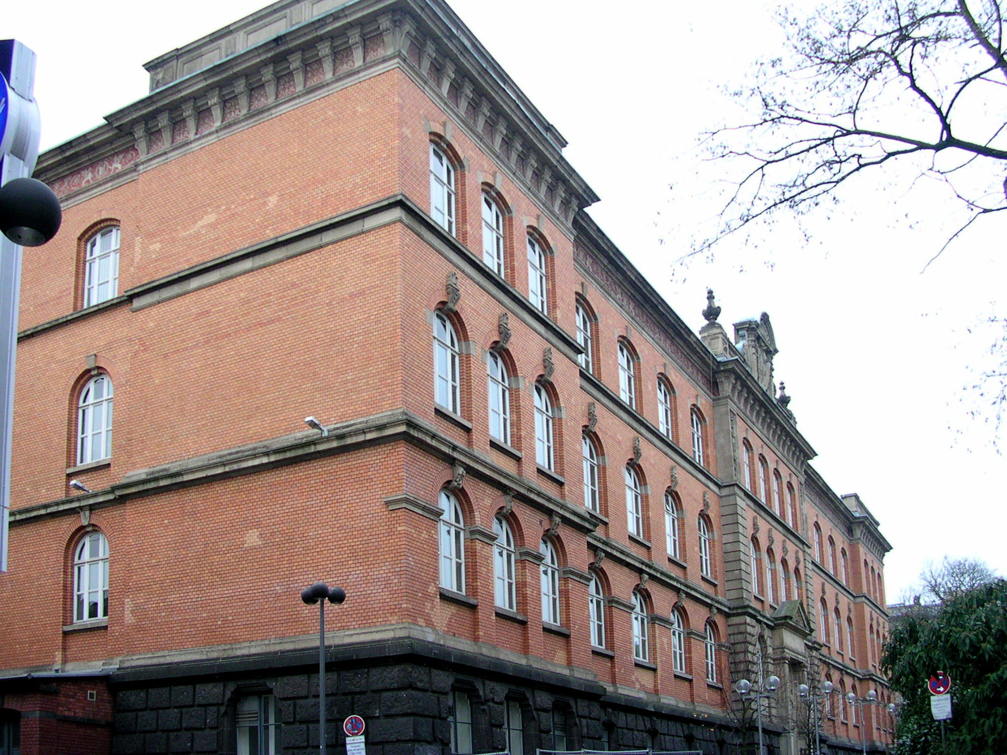 RWTH Aachen, Institute für Romanistik